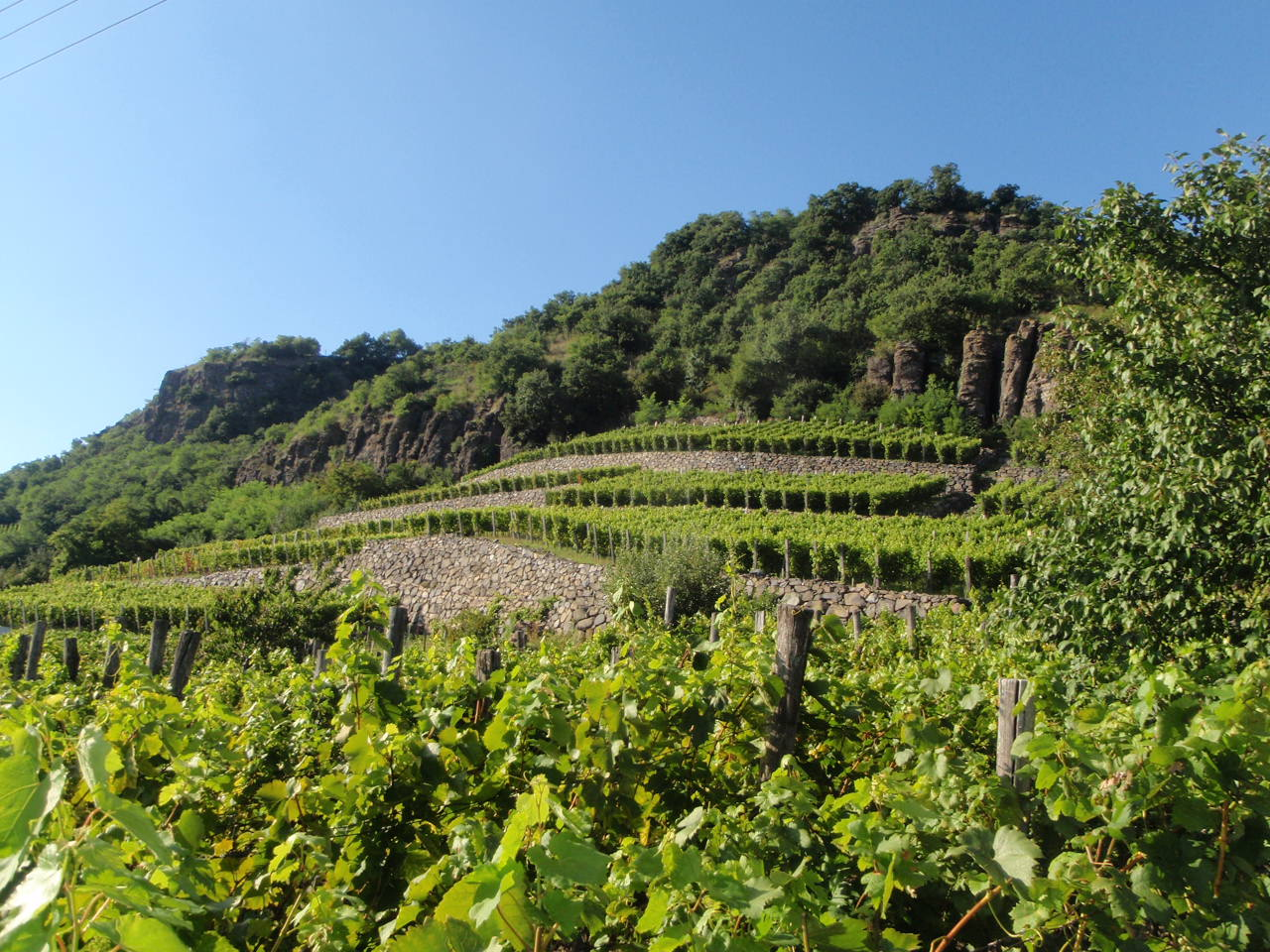 Weinberg in Somloerberg